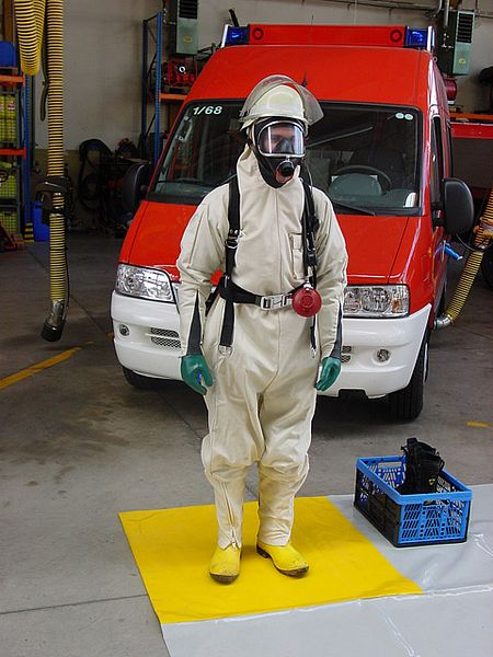 Kontaminationsschutzanzug